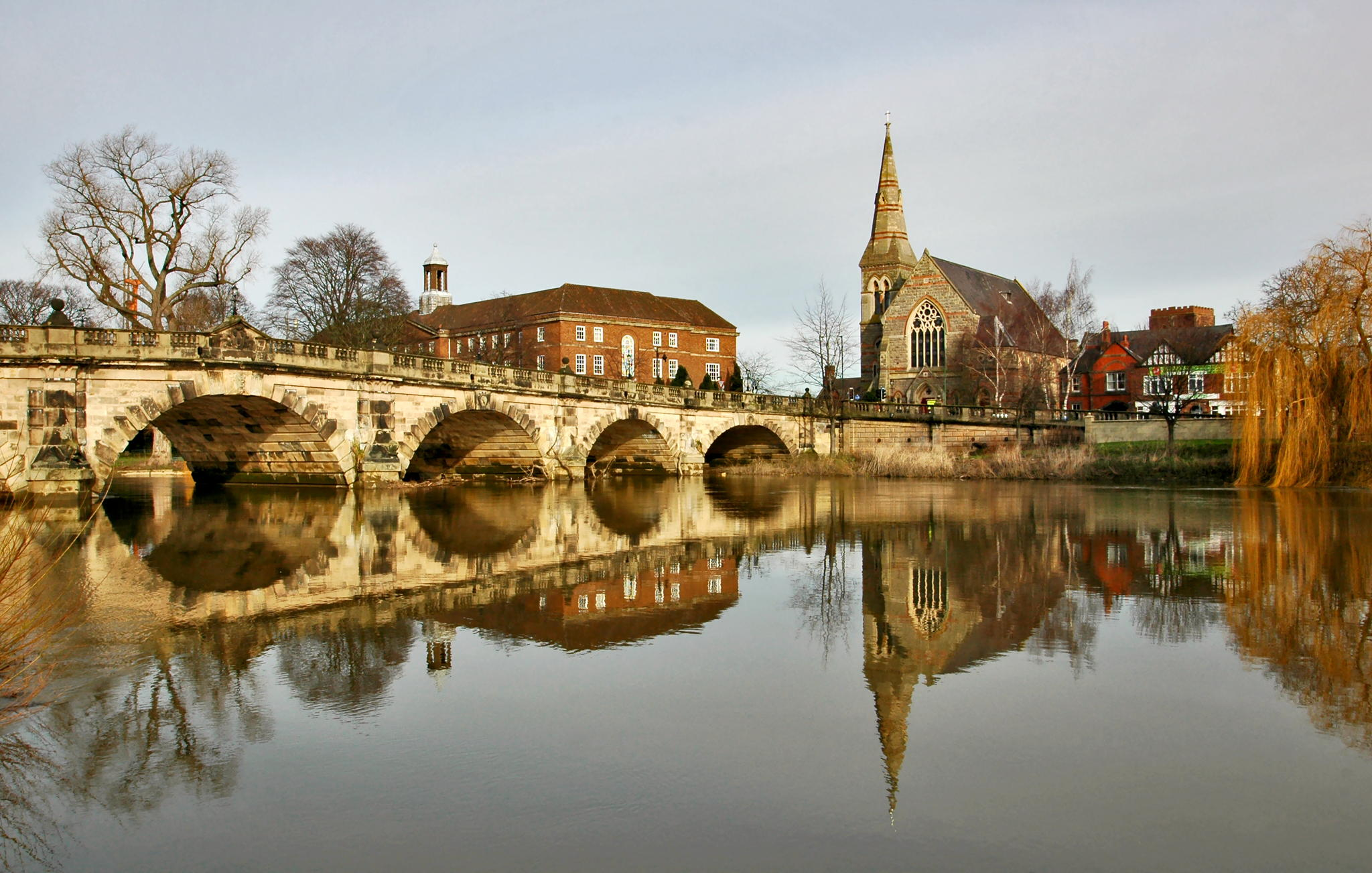 Мост в Шрусбери